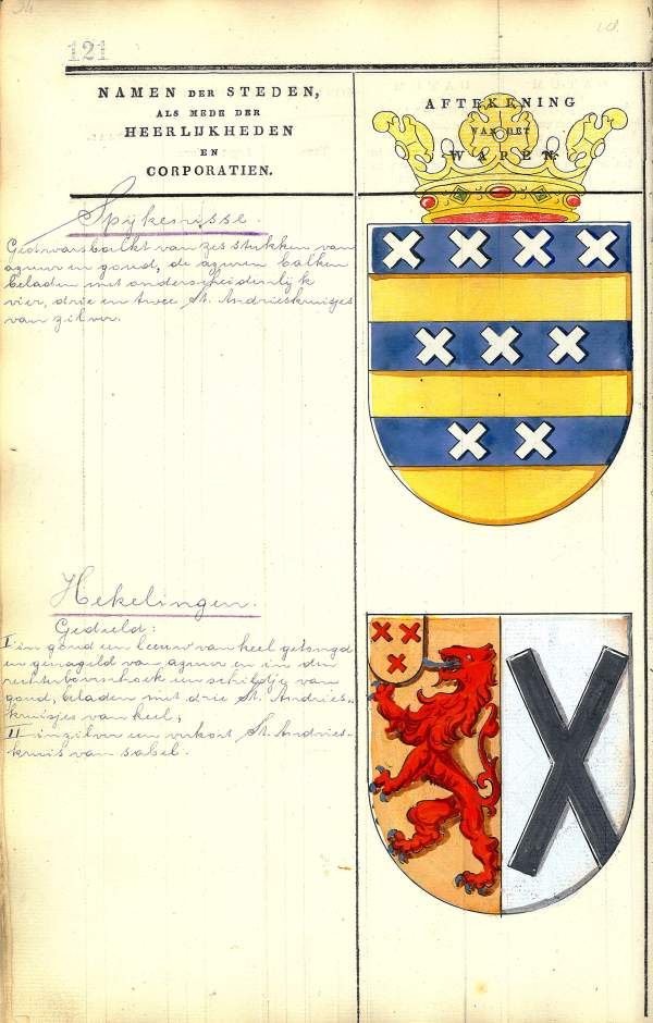 Het officiële registerblad met de gemeentewapens van Spijkenisse en Hekelingen in de Databank Overheidsheraldiek van de Hoge Raad van de Adel. Het wapen van Spijkenisse stamt uit 1936; in 1961 is de kroon toegevoegd. Beschrijving wapen Spijkenisse: Gedwarsbalkt van zes stukken van azuur en goud, de azuren balken beladen met onderscheidenlijk vier, drie en twee St. andrieskruisjes van zilver. Het schild gedekt met een gouden kroon van drie bladeren en twee parels. Beschrijving wapen Hekelingen: Gedeeld; I in goud een leeuw van keel, getongd en genageld van azuur, in den rechterbovenhoek een schildje van goud beladen met drie St.Andrieskruisen van keel, II in zilver een verkort St. Andrieskruis van sabel.